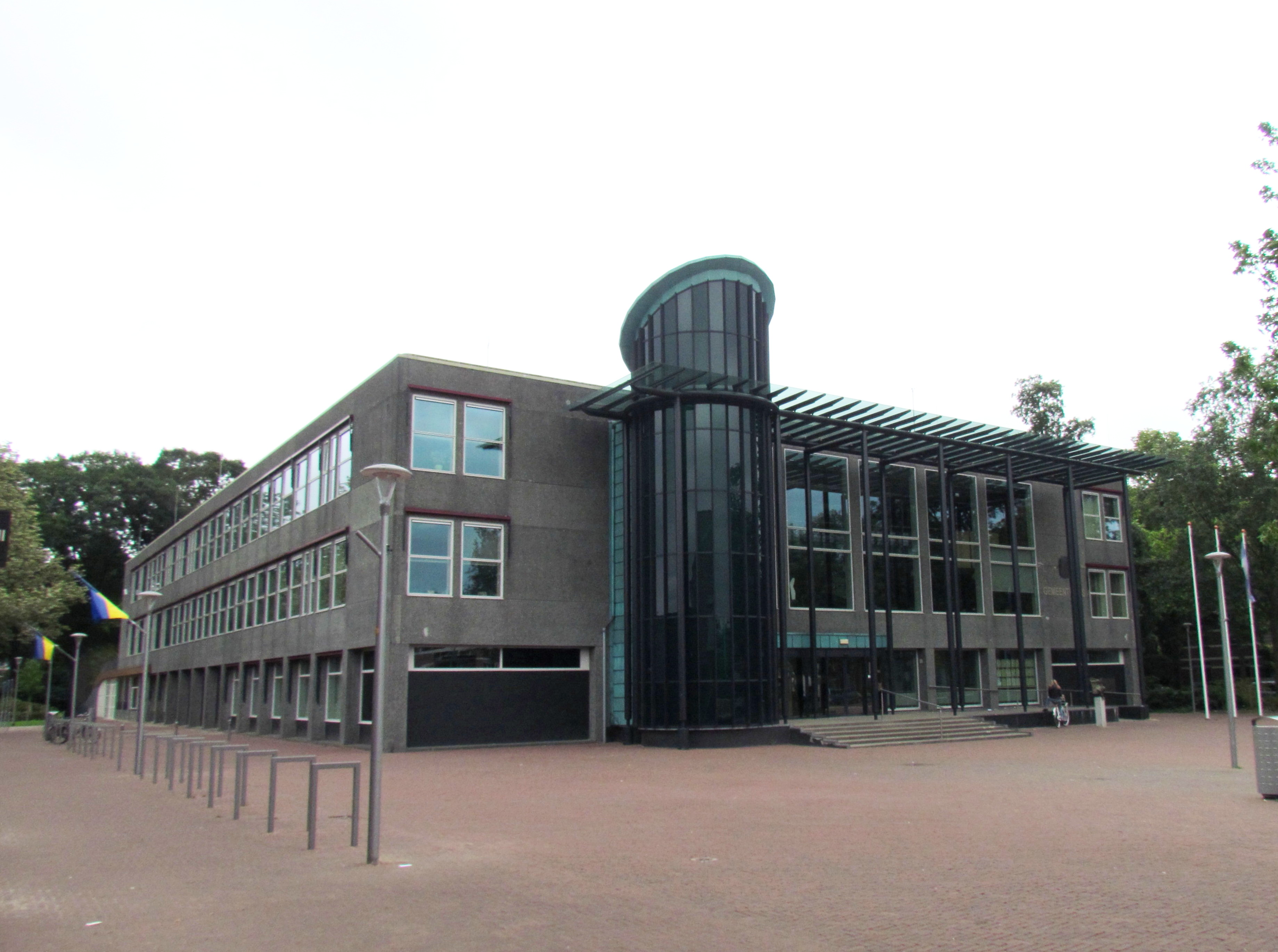 Gemeentehuis van Epe (NL), Markt 1, Epe